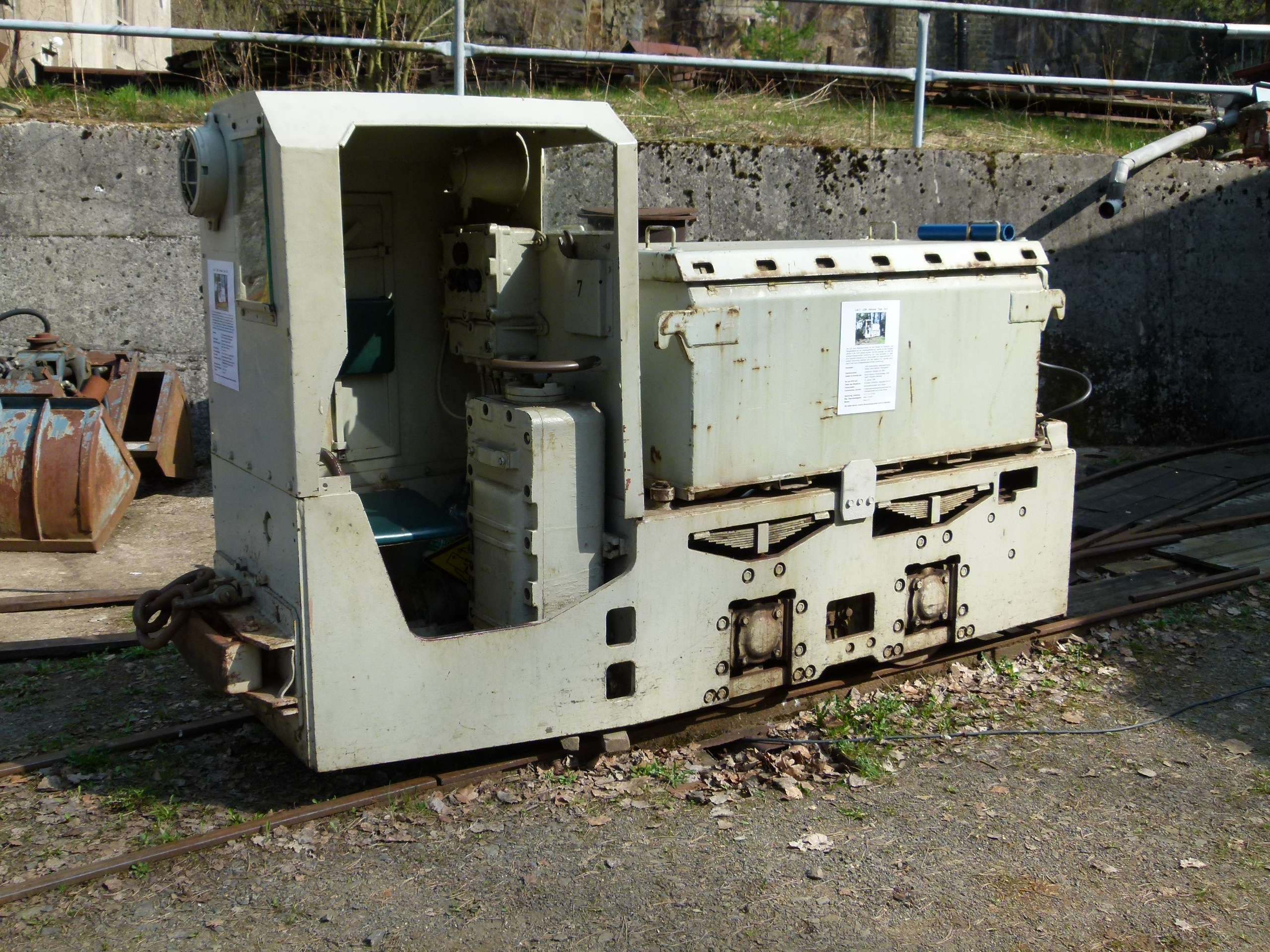 Akkulok EL 9/01, Baujahr 1980, Hersteller: VEB Lokomotivbau Hennigsdorf, Feldbahnmuseum Herrenleite, bei Pirna / Dresden, Sachsen